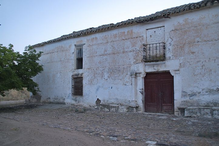 Estado de la fachada principal de la Venta de Borondo en 2011.